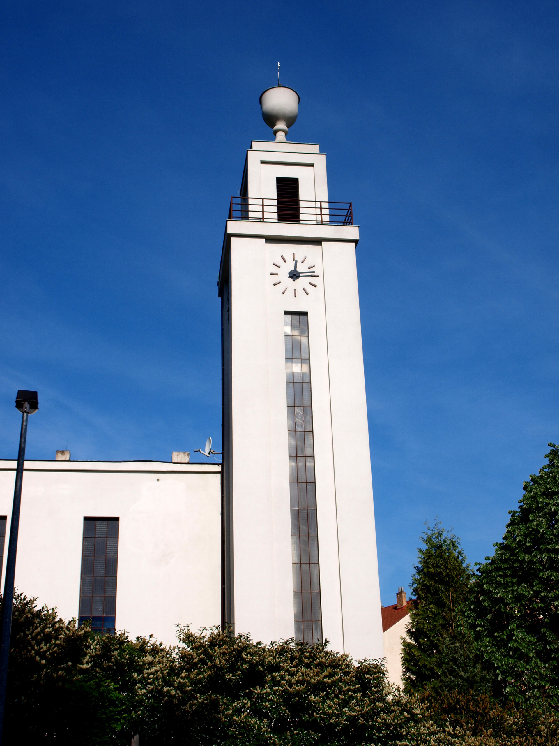 Husův sbor, Praha-Smíchov (Santoška)